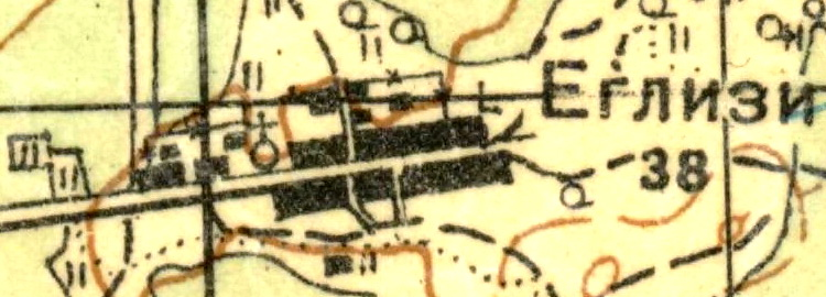 Топографическая карта Ленинградской области, квадрат О-36-14-А (п. Фёдоровский), деревня Еглизи